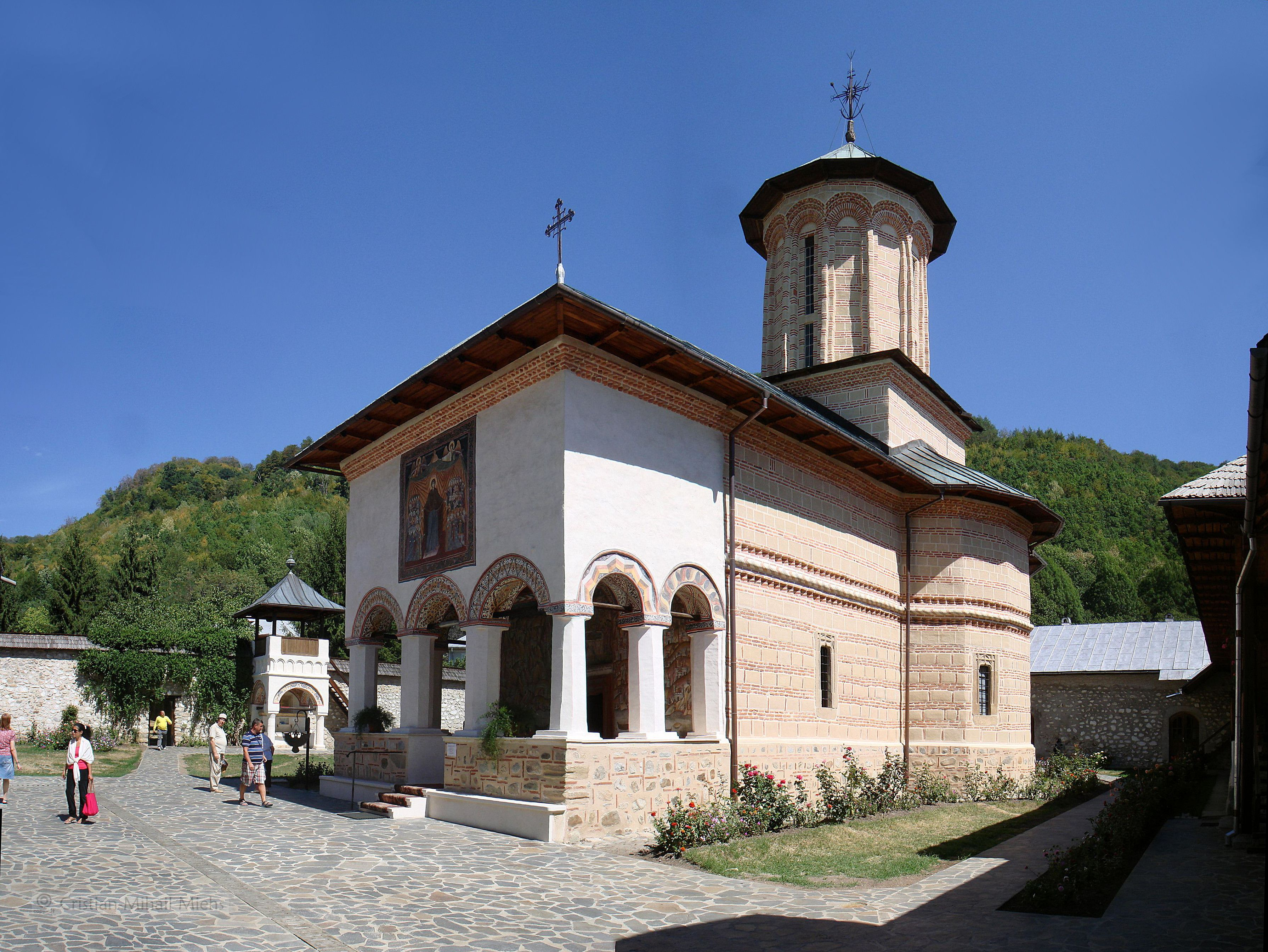 Biserica mănăstirii Polovragi